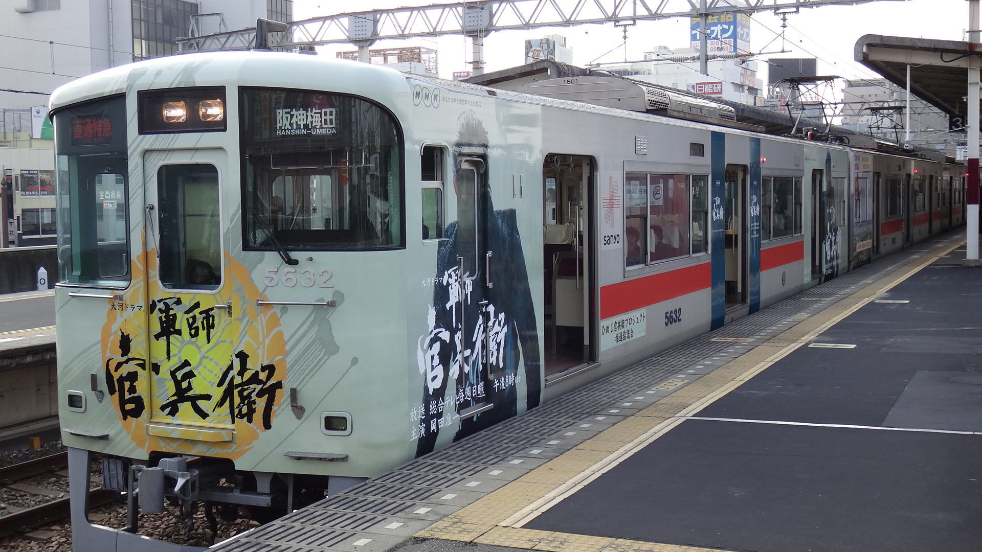 山陽電車で運行の「官兵衛」号